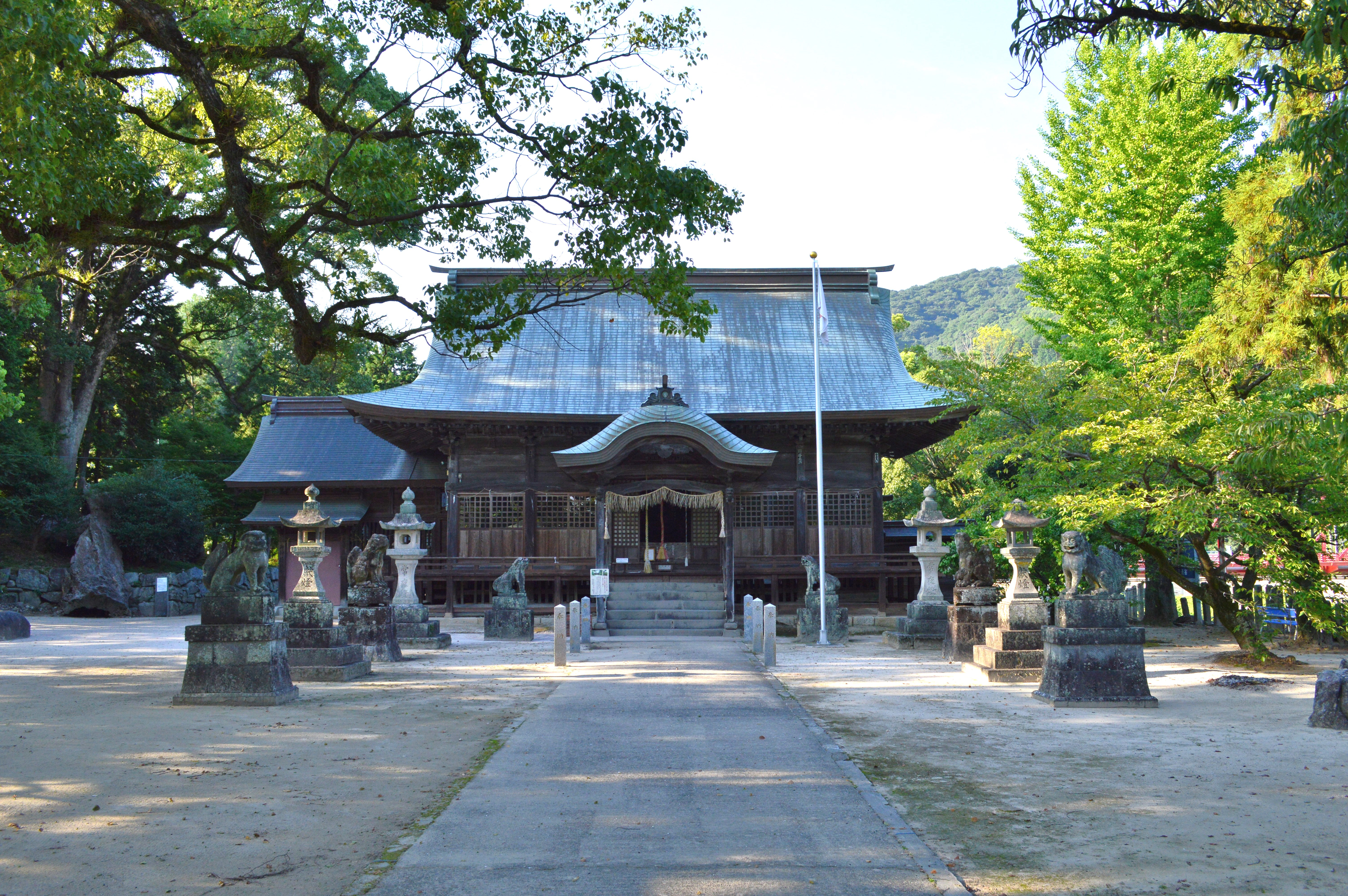 與止日女神社 拝殿